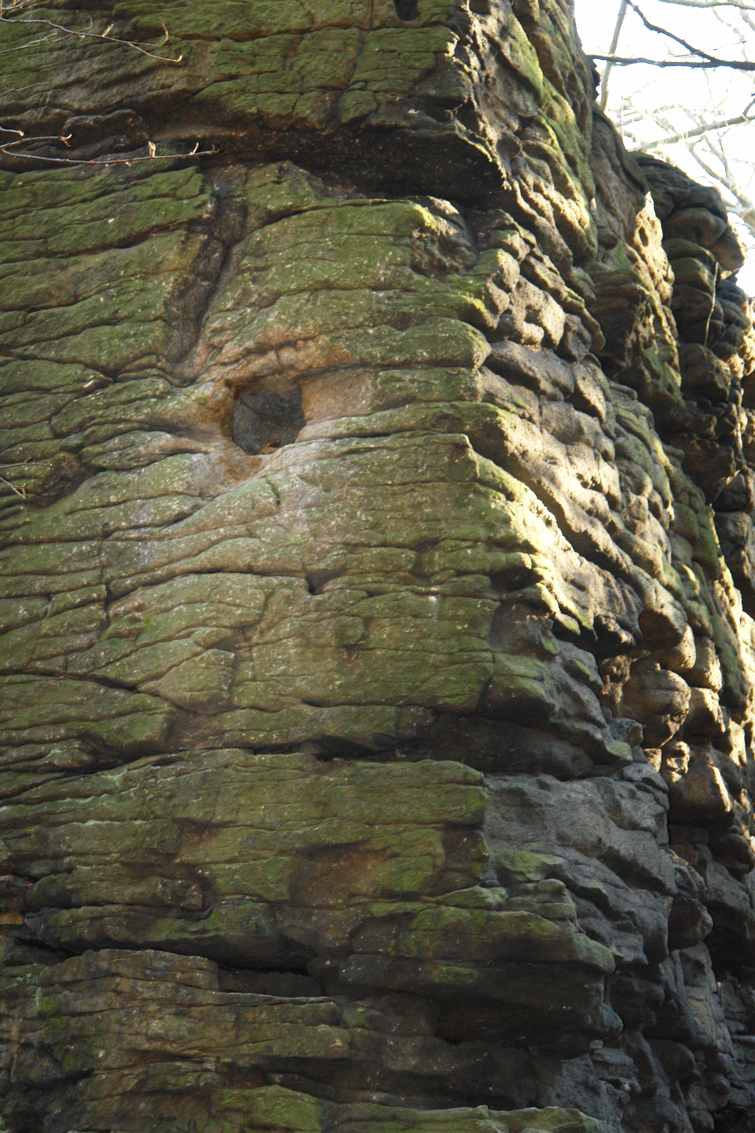 Das Teufelsfenster auf dem Czorneboh nahe Bautzenin Sachsen, Deutschland. Dabei handelt es sich um ein Loch im Felsen, aus dem das Orakel sprach.